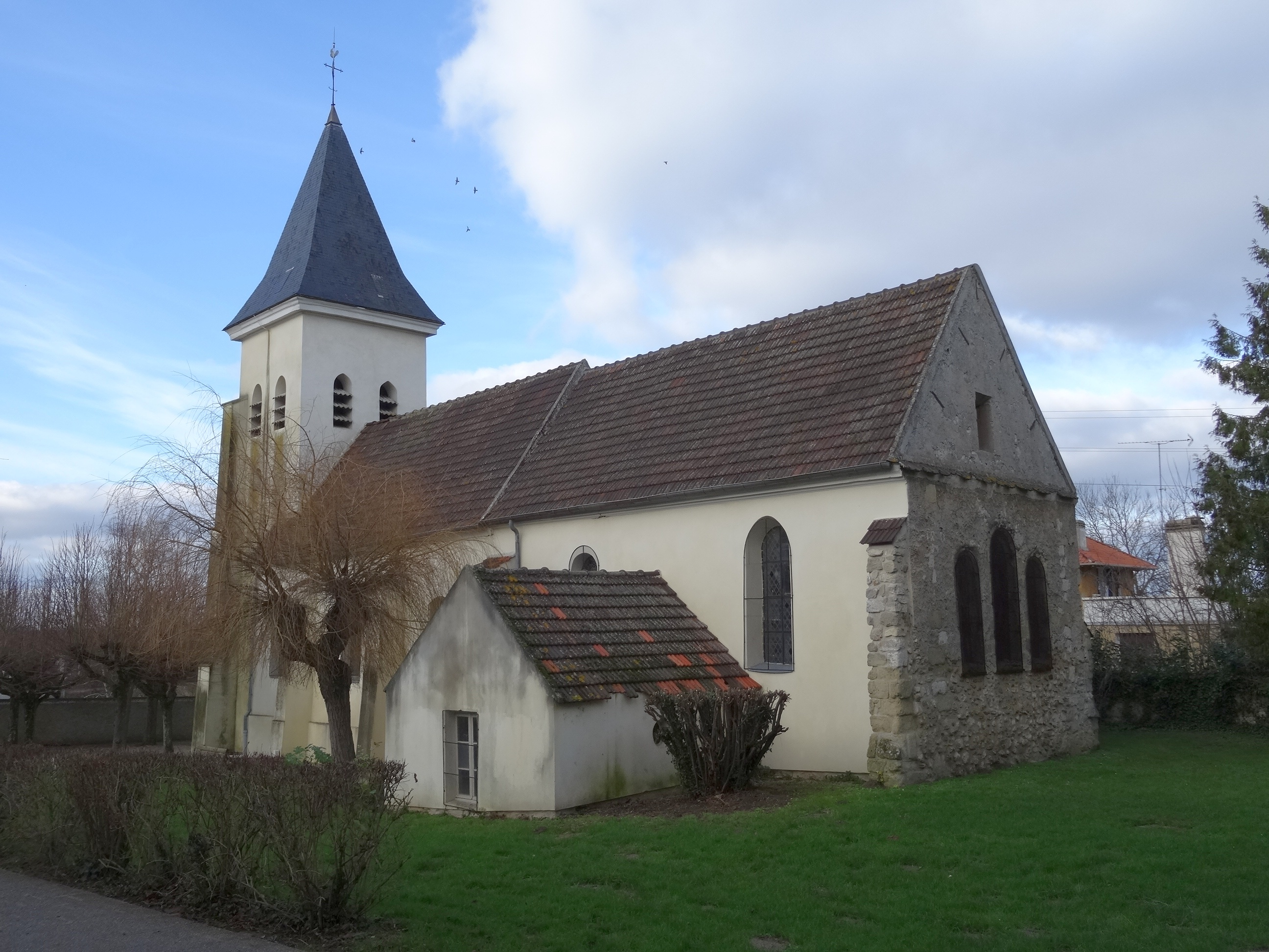 Église Saint-Sidoine de Jablines. (Seine-et-Marne, région Île-de-France).